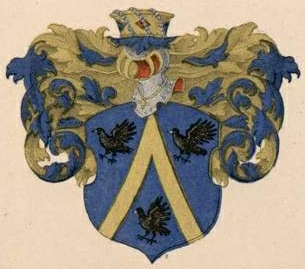 Mestmacheri suguvõsa parunivapp